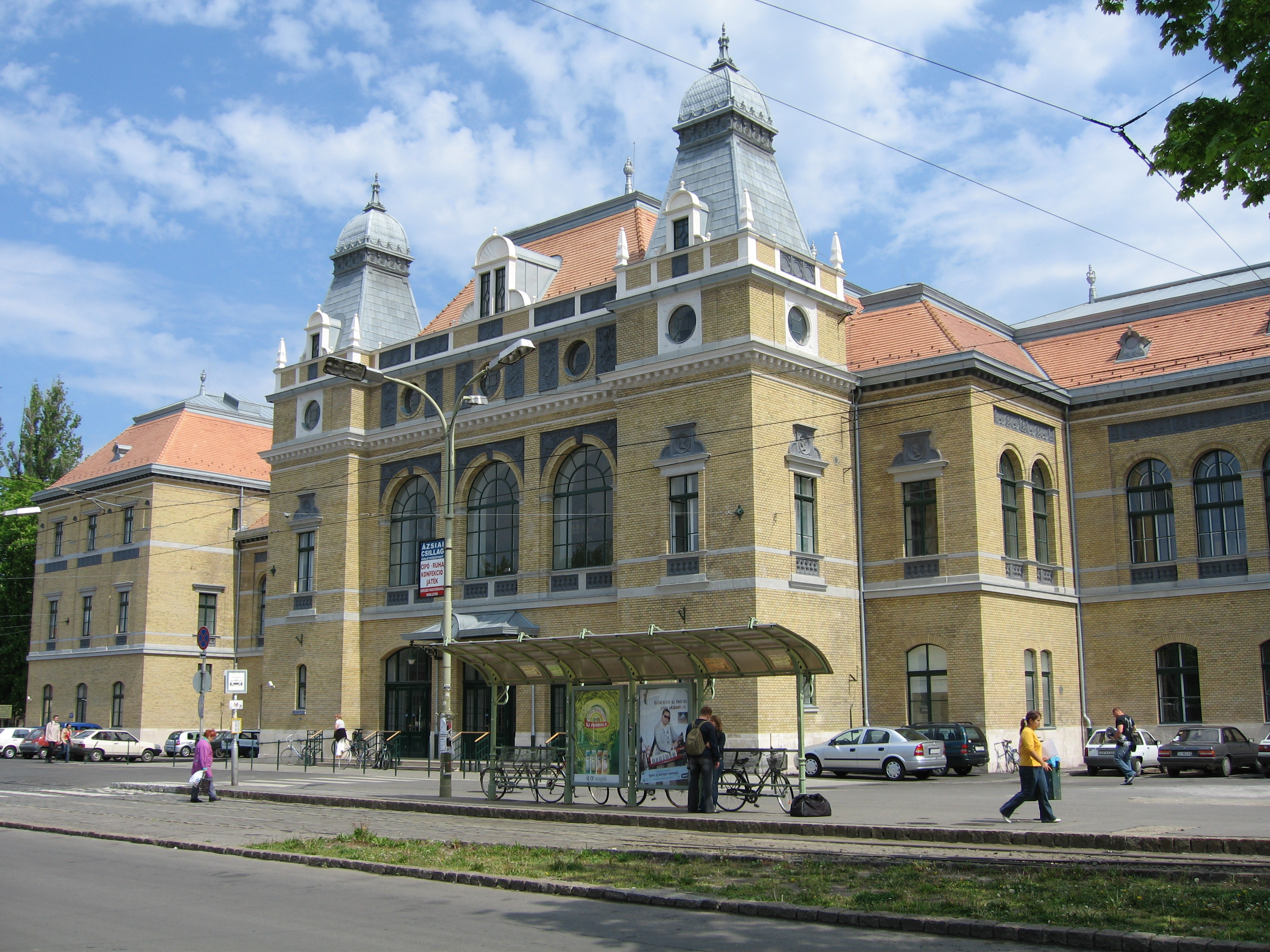 A szegedi vasútállomás épülete